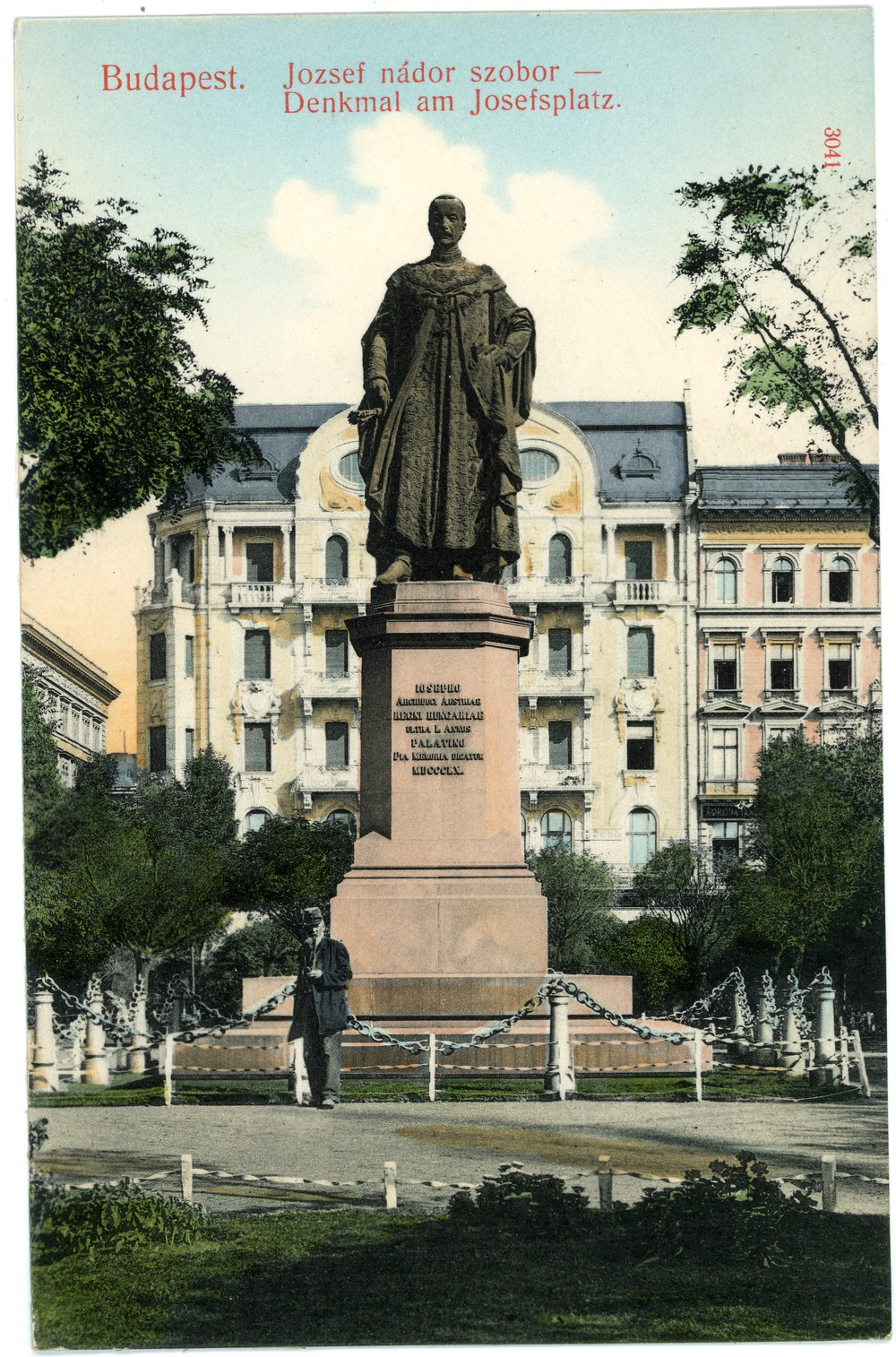 Budapest; Denkmal am Josefsplatz Diese Ansichtskarte stammt vom Kunstverlag Brück & Sohn aus Meißen ( Die Karte hat die eindeutige Nummer 03041 und ist in höherer Auflösung beim Verlag erhältlich. Sie wurde im Rahmen einer Kooperation zwischen Wikipedianern und dem Kunstverlag für Wikimedia Commons zur Verfügung gestellt.